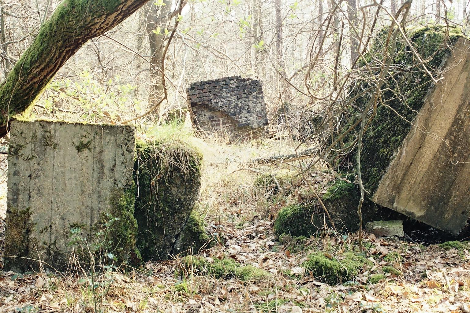 V1-Stellung im Nutscheid, Ruppichteroth, Fundamentreste der Pendelstützen